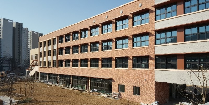 백운호수초등학교 전경